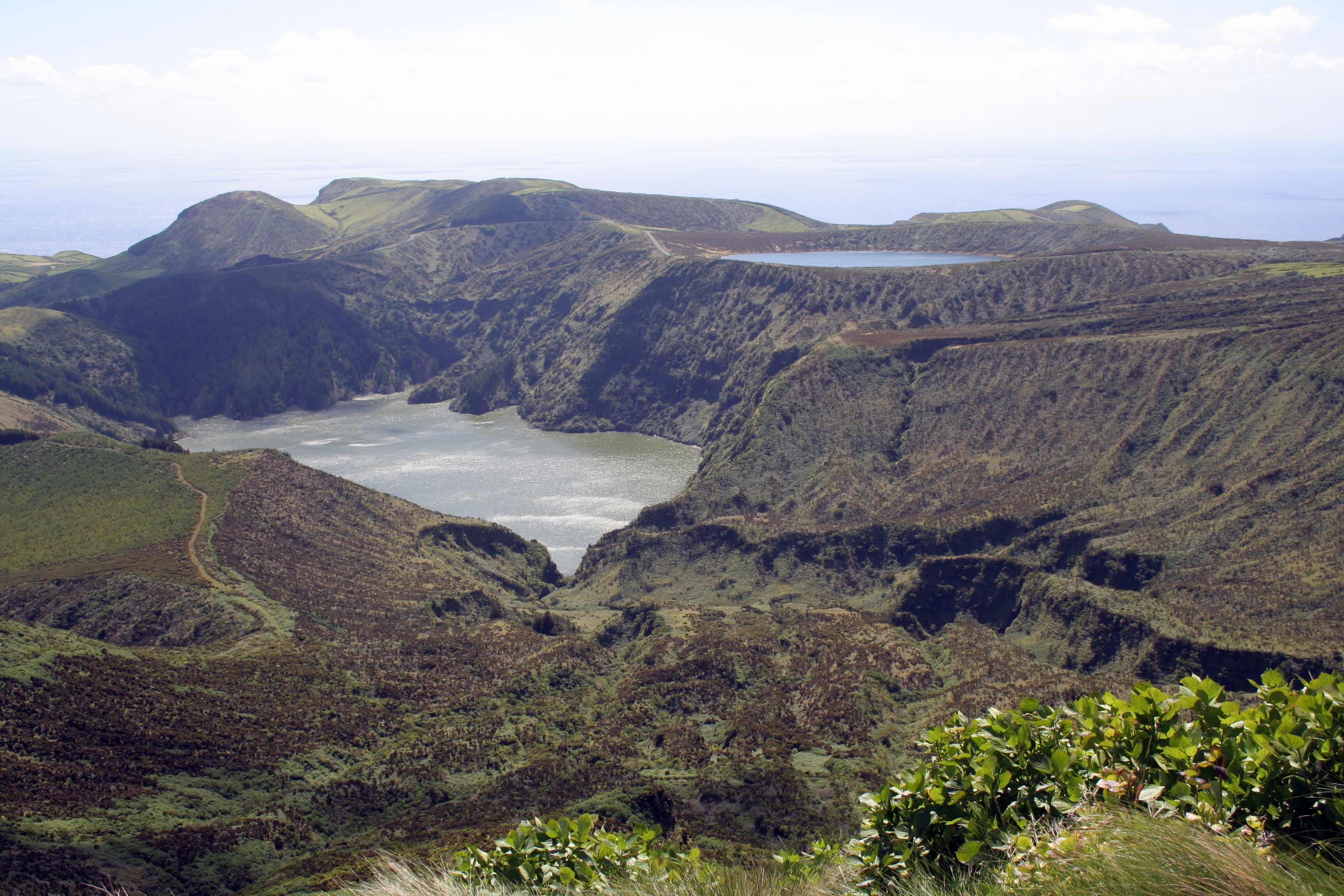 Flores, Caldera Funda/ Caldera Rasa